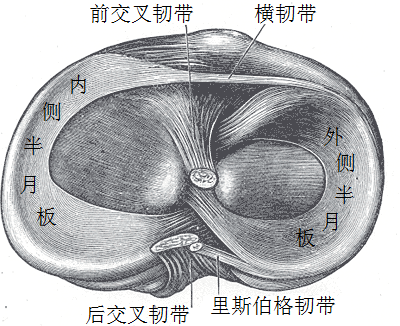 右侧胫骨的俯视图，可见半月板及韧带连接点。